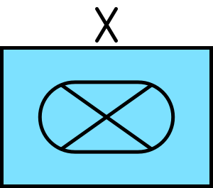 Taktisches Teichen eines Heavy Brigade Combat Teams (US-Kampfbrigaden-Typ)